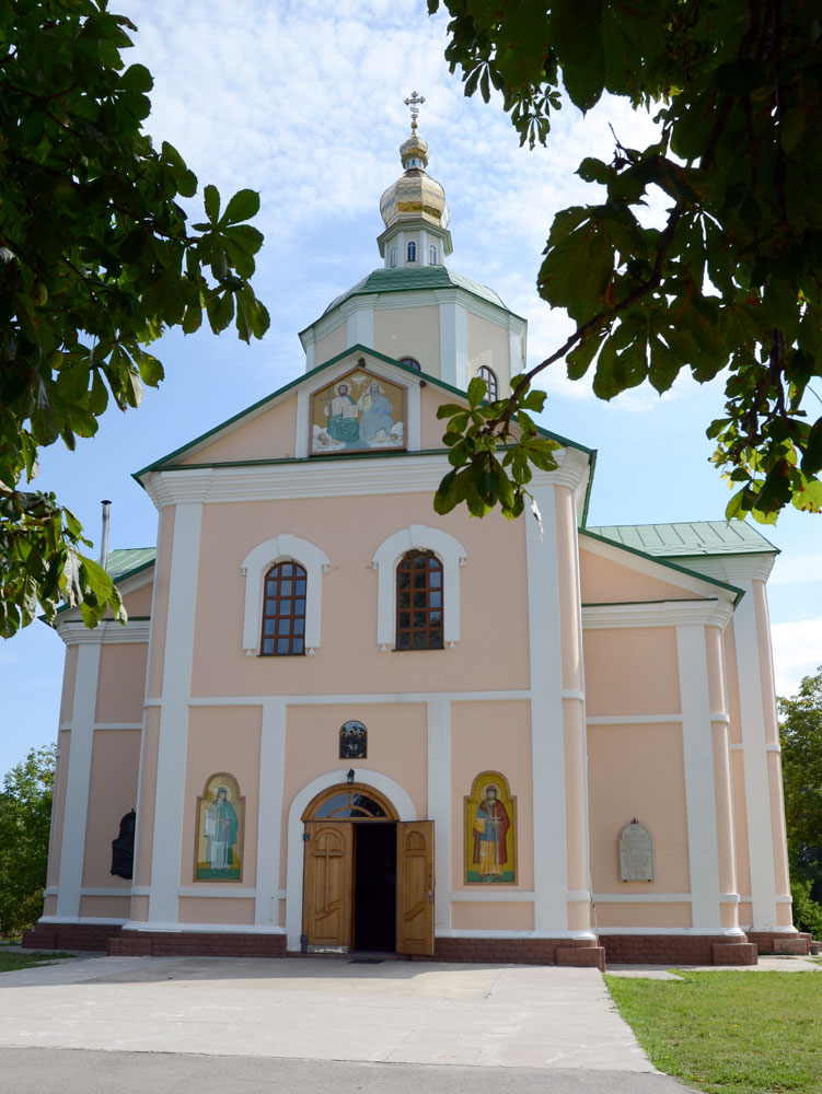 Свято-Троицкий Мотронинский женский монастырь